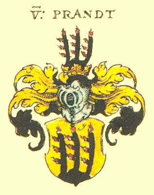 Wappen des Bayerischen und Fränkischen Adelsgeschlechts Brandt / Prandt.